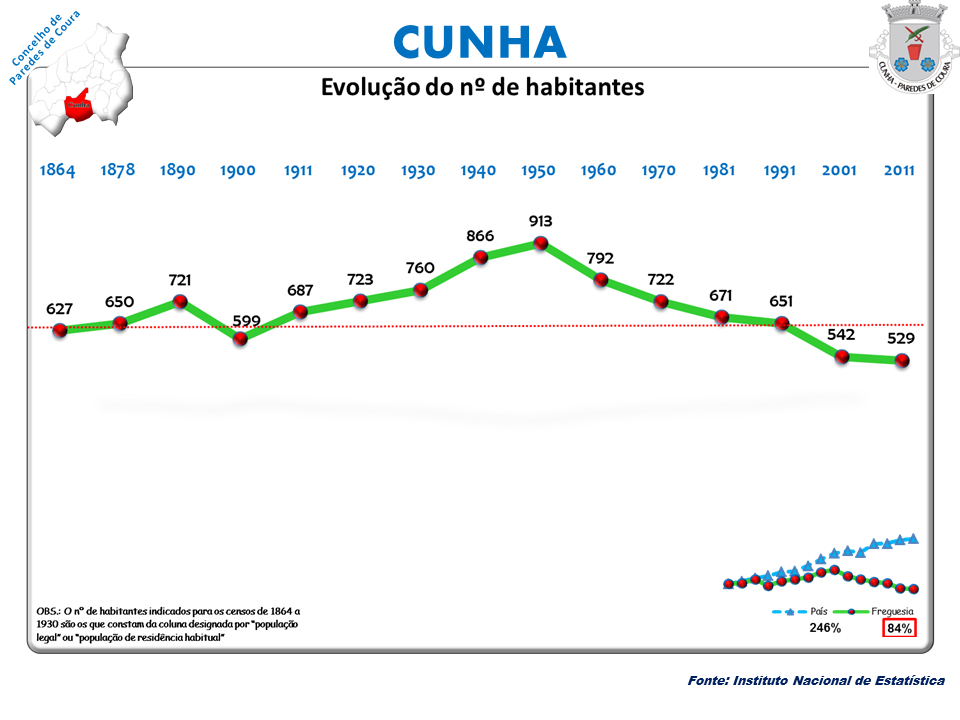 Censos 1864/2011